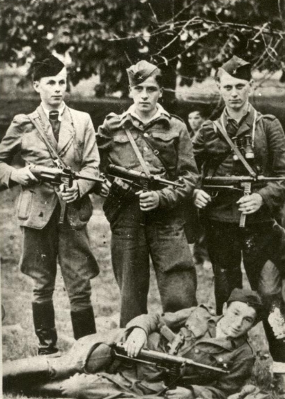 Kurirji postaje VK 1-21. Na fotografiji z leve strani: Anton Brece, Jože Radej, Fric Hupak.